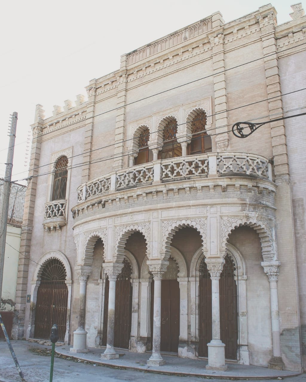 Casa Mudéjar en la ciudad de Torreón, en Coahuila, México